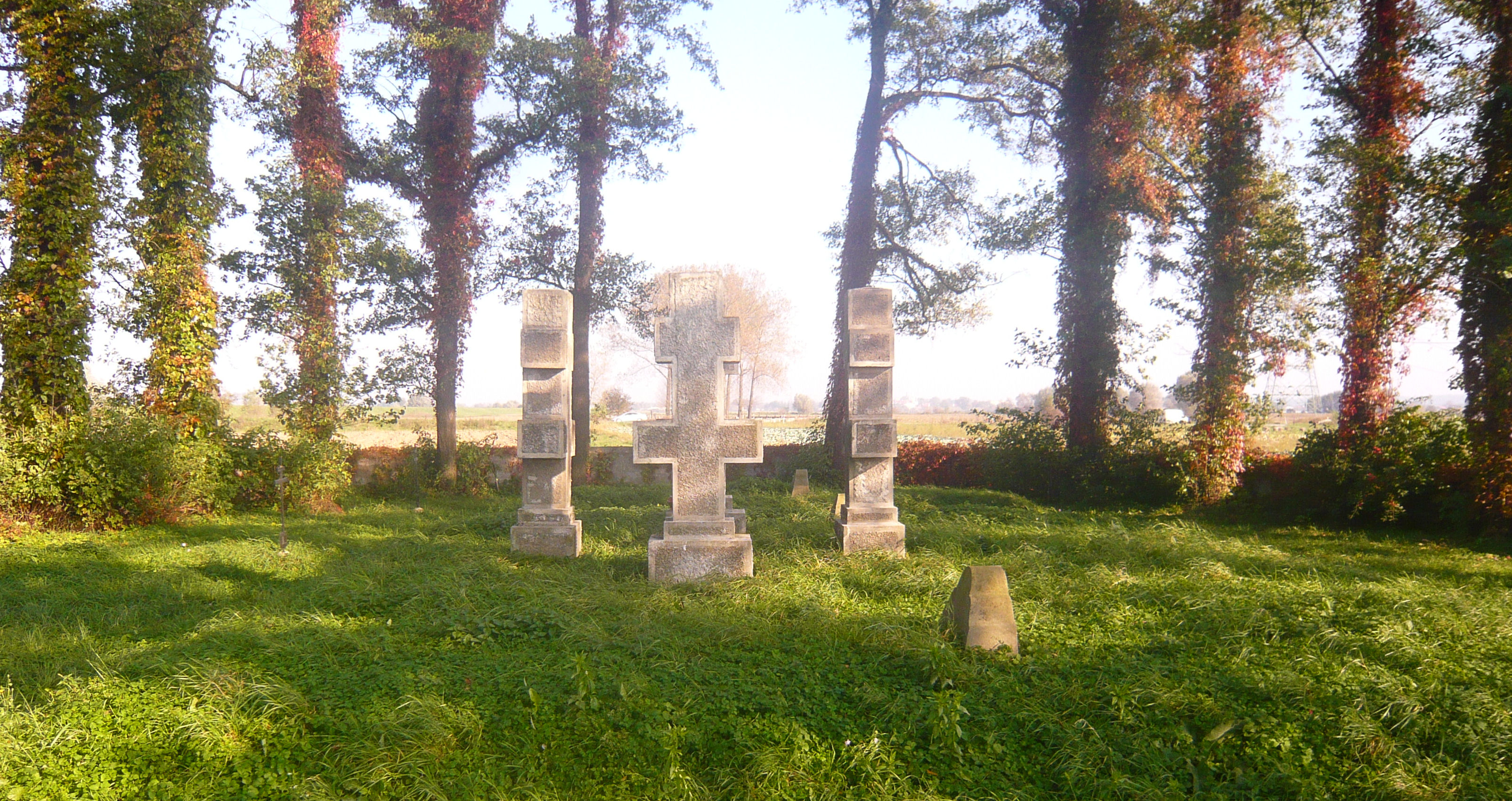 Cmentarz wojenny nr 257 - Biskupice Radłowskie Zawodzie